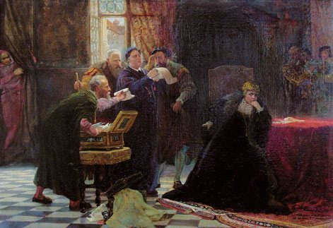 Abdykacja królowej Bony